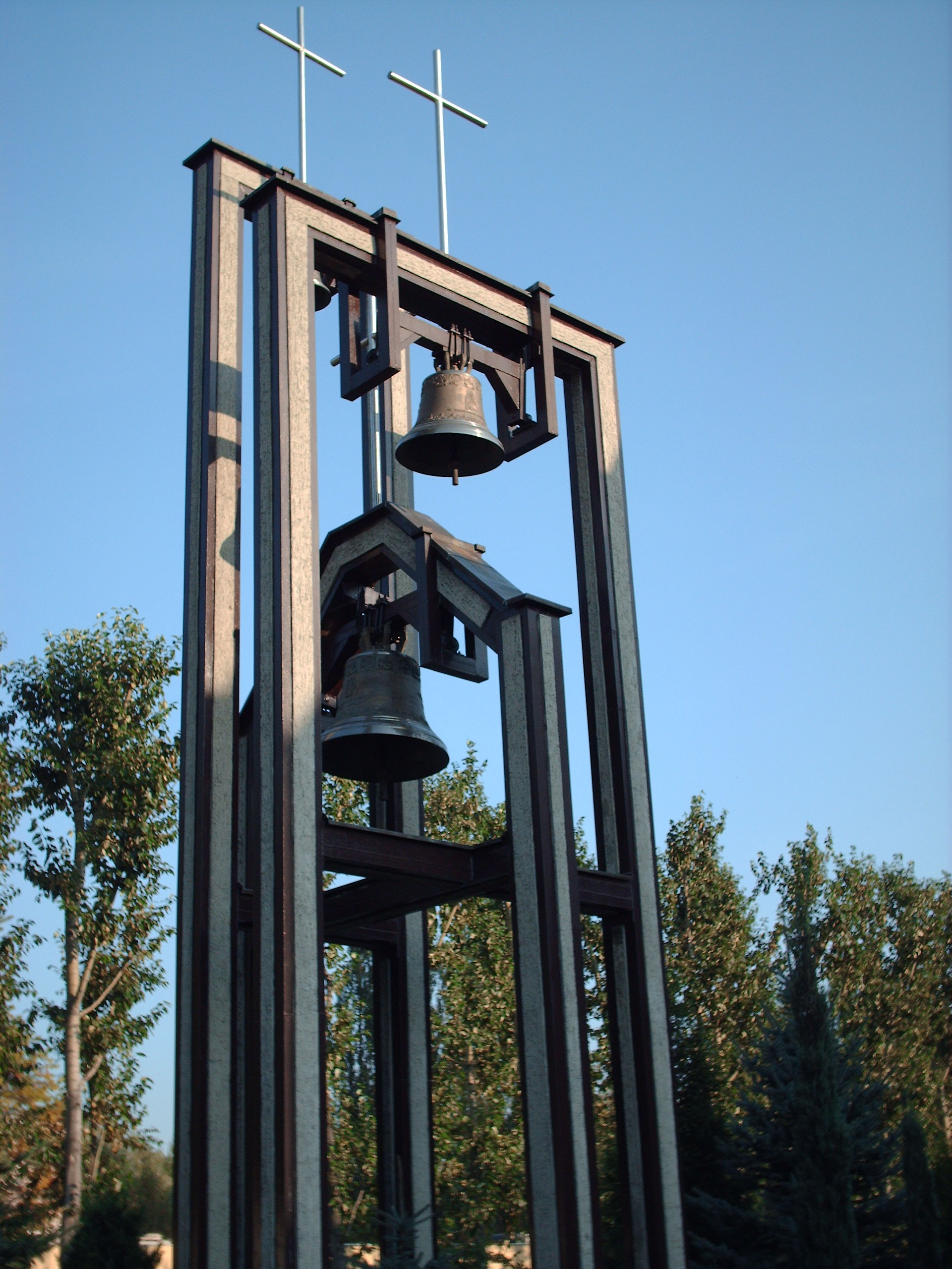 Dzwony przy parafii Matki Boskiej Częstochowskiej w Gliwicach.